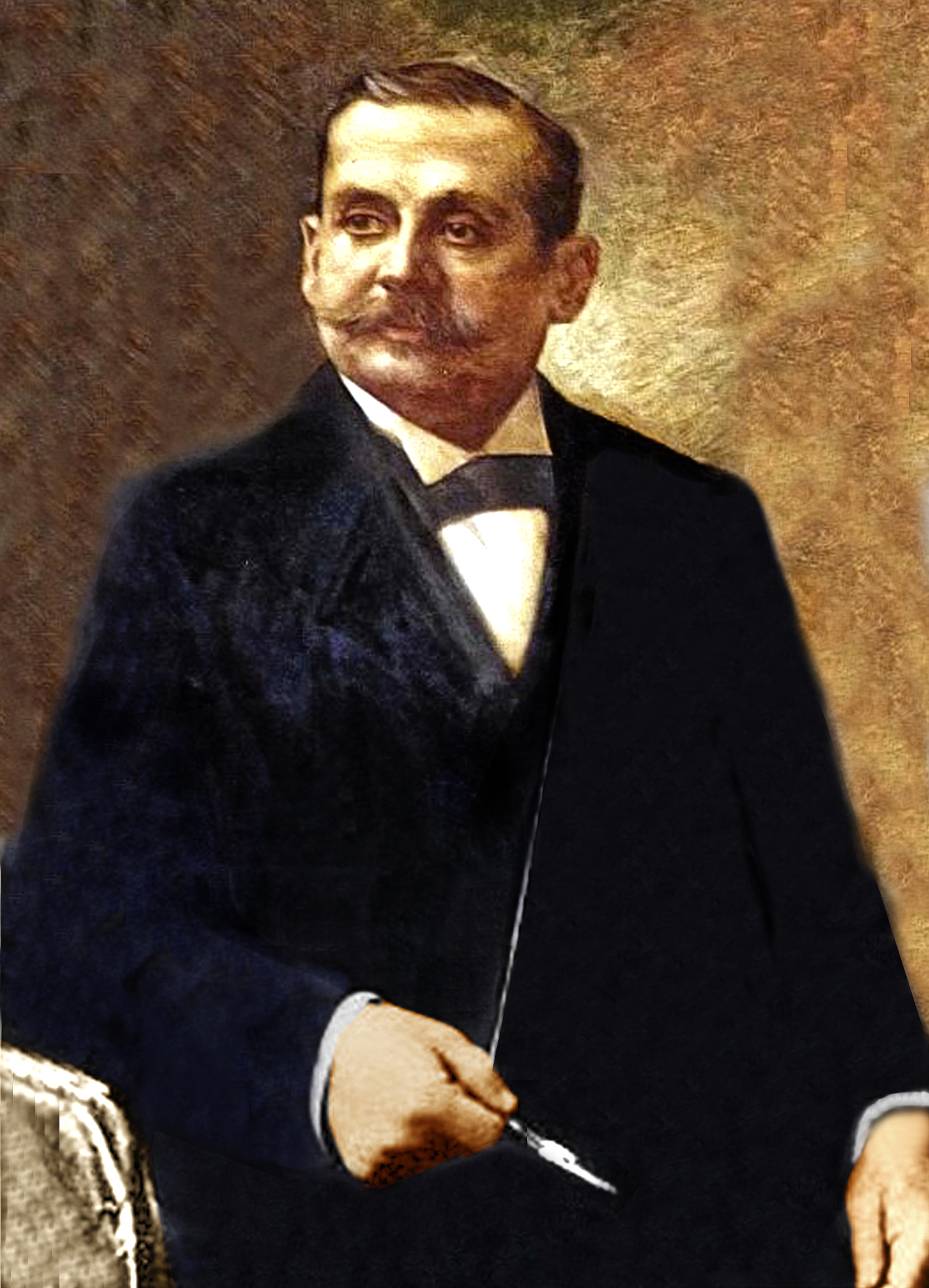 Guillermo billingurst